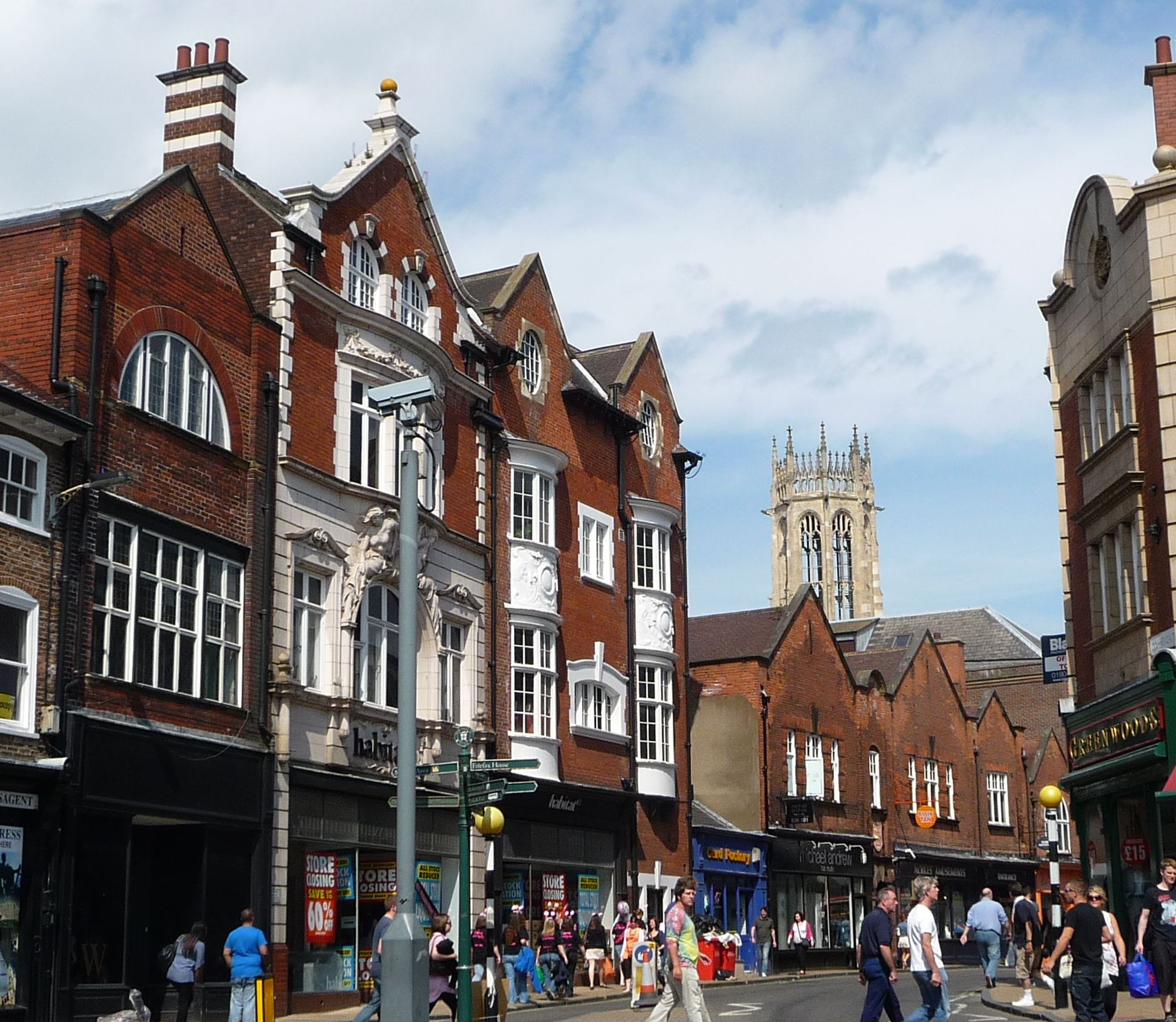 street in York